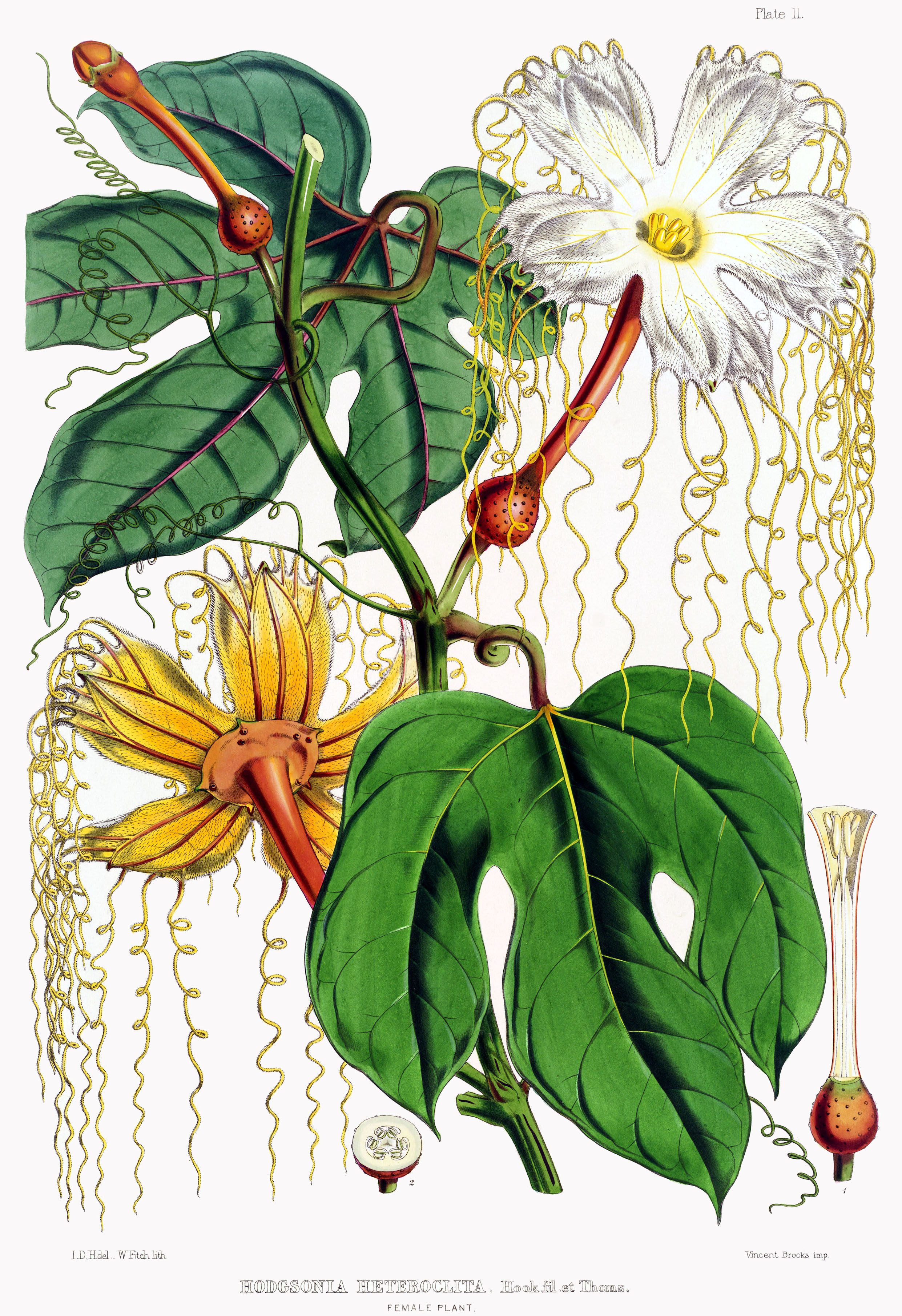 Hodgsonia heteroclita female plant